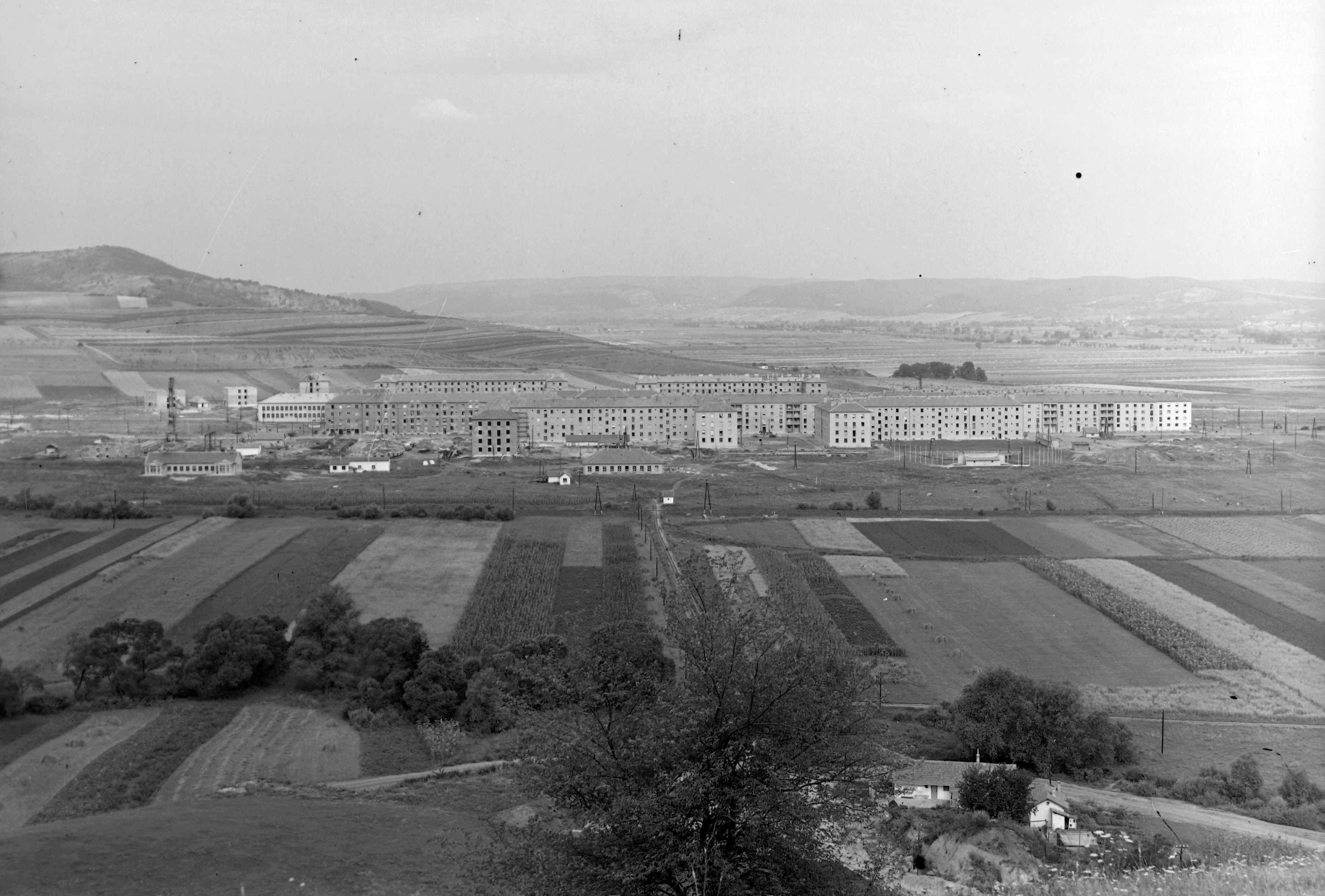 az épülő város látképe a Nagy-Bondor felől. Location: Hungary Tags: picture Title: az épülő város látképe a Nagy-Bondor felől.